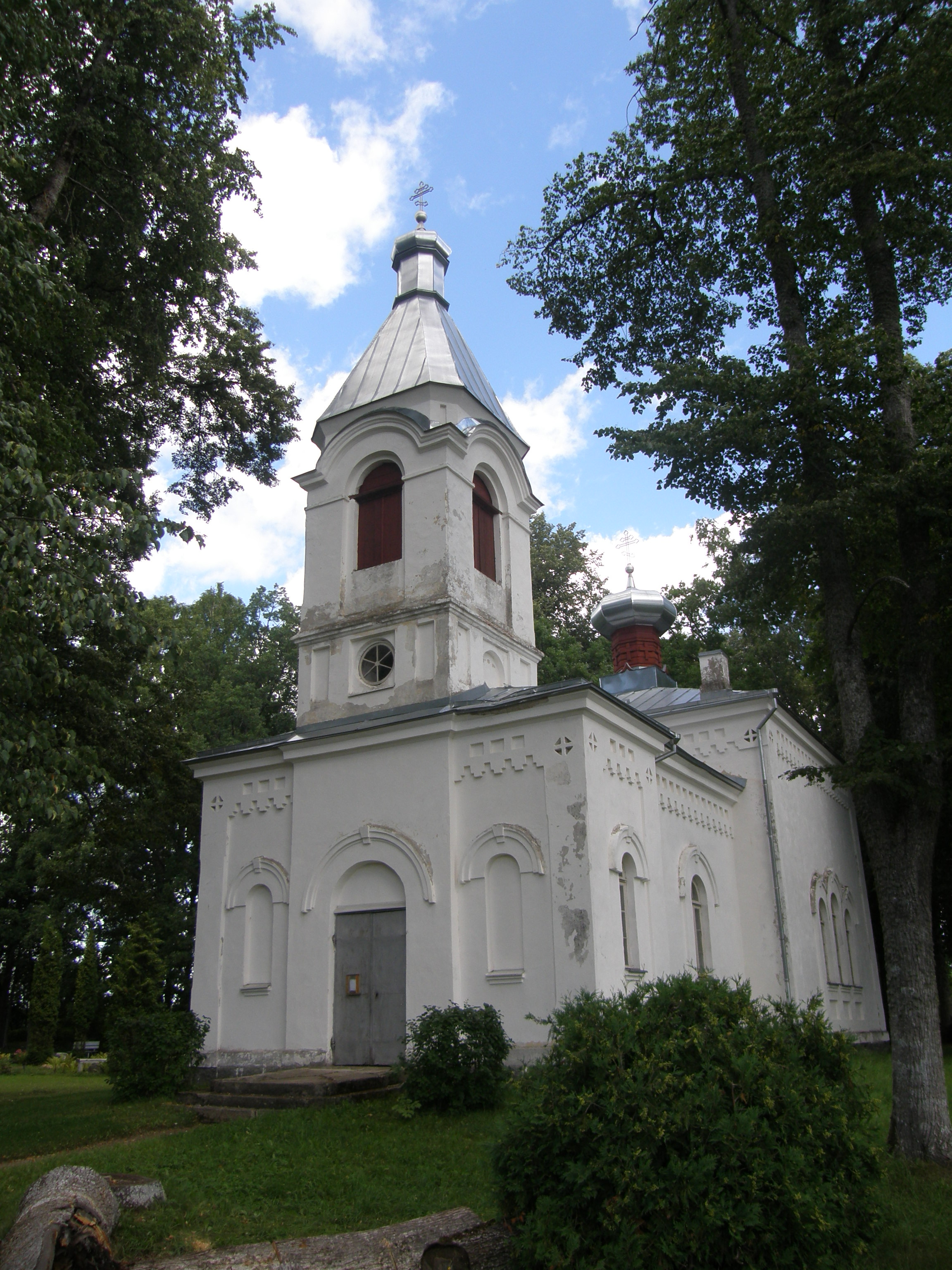 Kaarepere vaga Suzdali Eufimi ja vaga Egiptuse Maria kirik